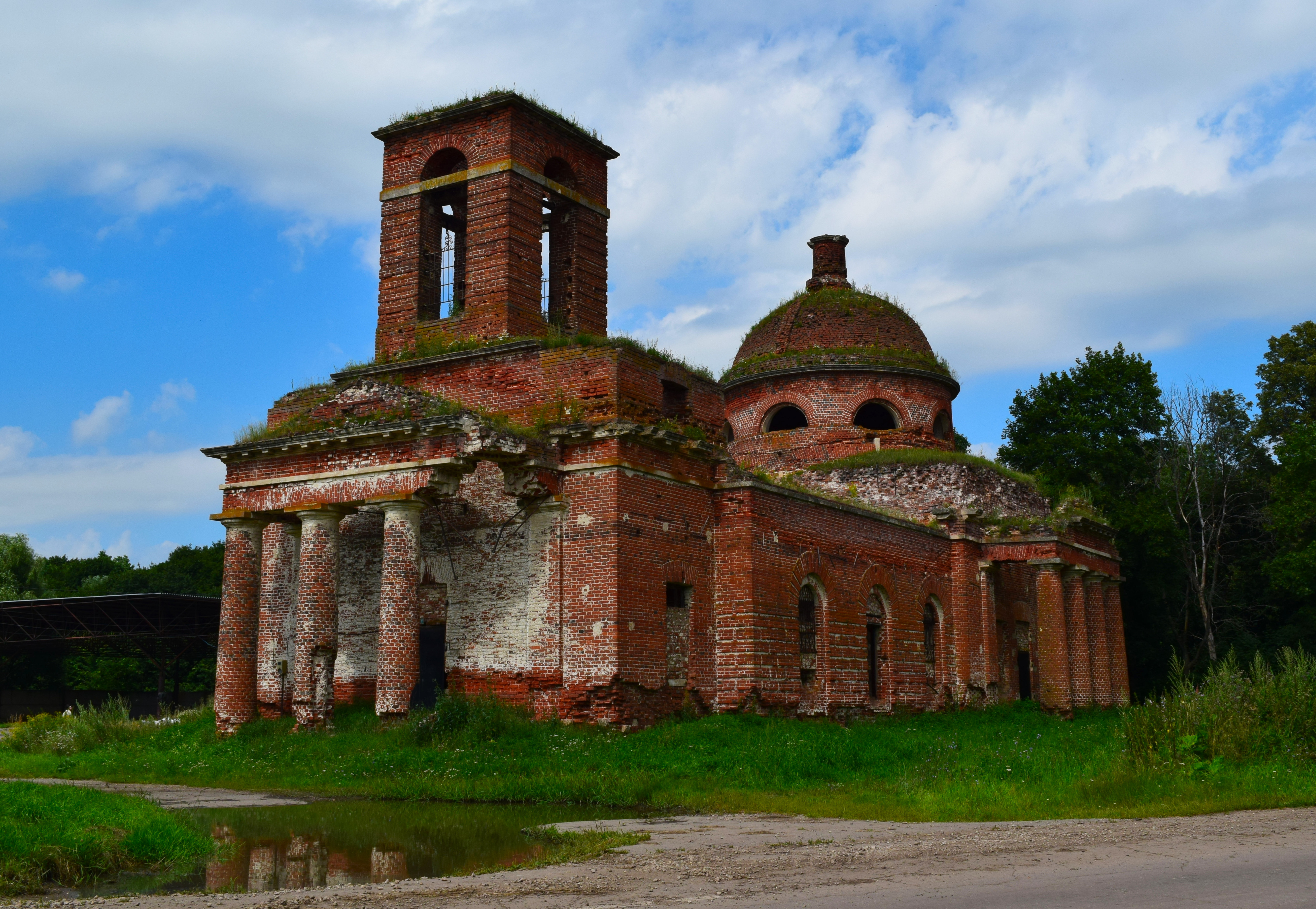 Никольская церковь: Осово, Захаровский район, Рязанская область